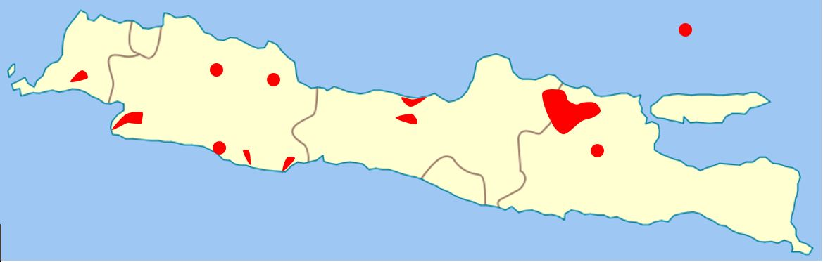 Rozšíření prasete sundského